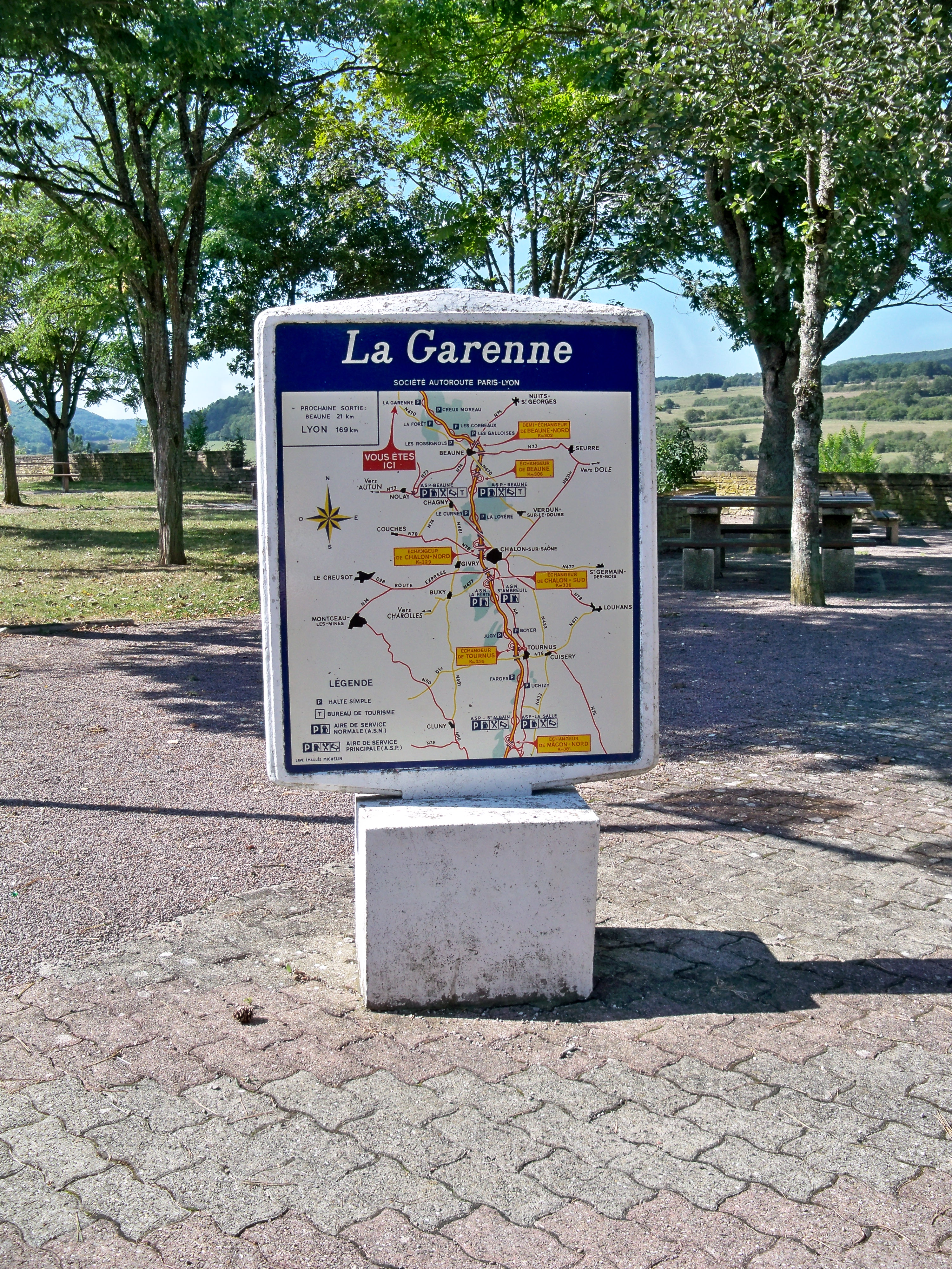 Plan Michelin de l'autoroute A6 sur l'aire de repos La Garenne